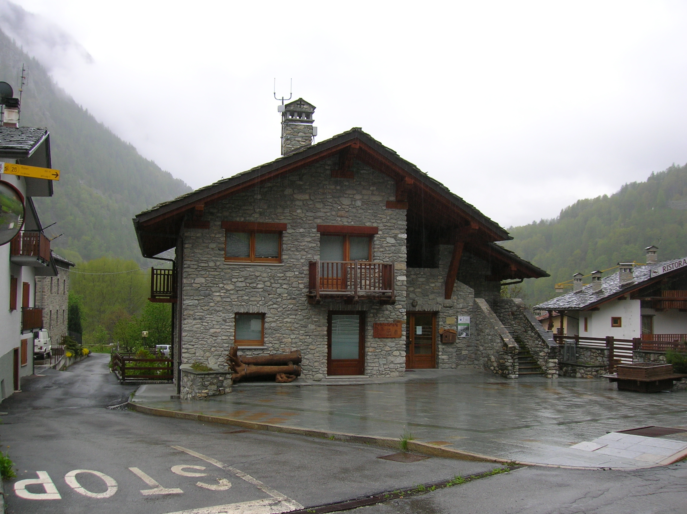 Biblioteca di Valpelline, Valle d'Aosta, Italia. Nella biblioteca ha sede il Museo della Resistenza.